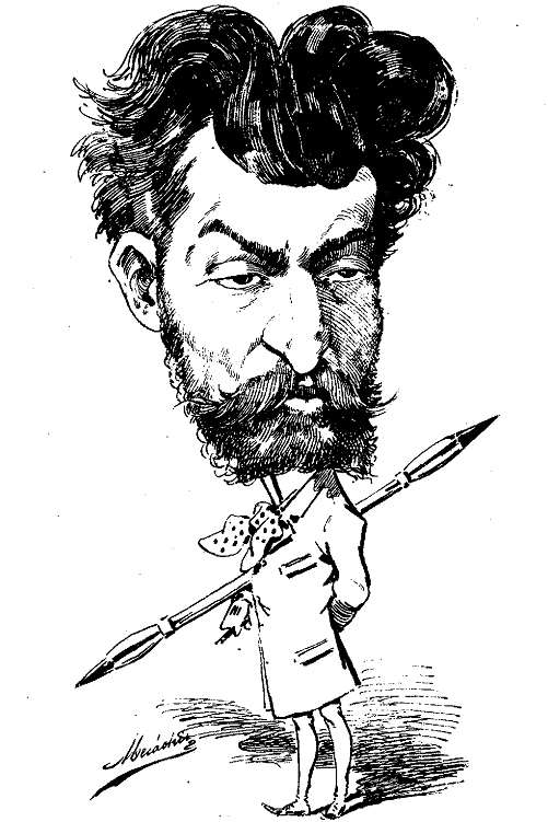 Caricatura de José Luis Pellicer, publicada en la revista españolaMadrid Cómico.